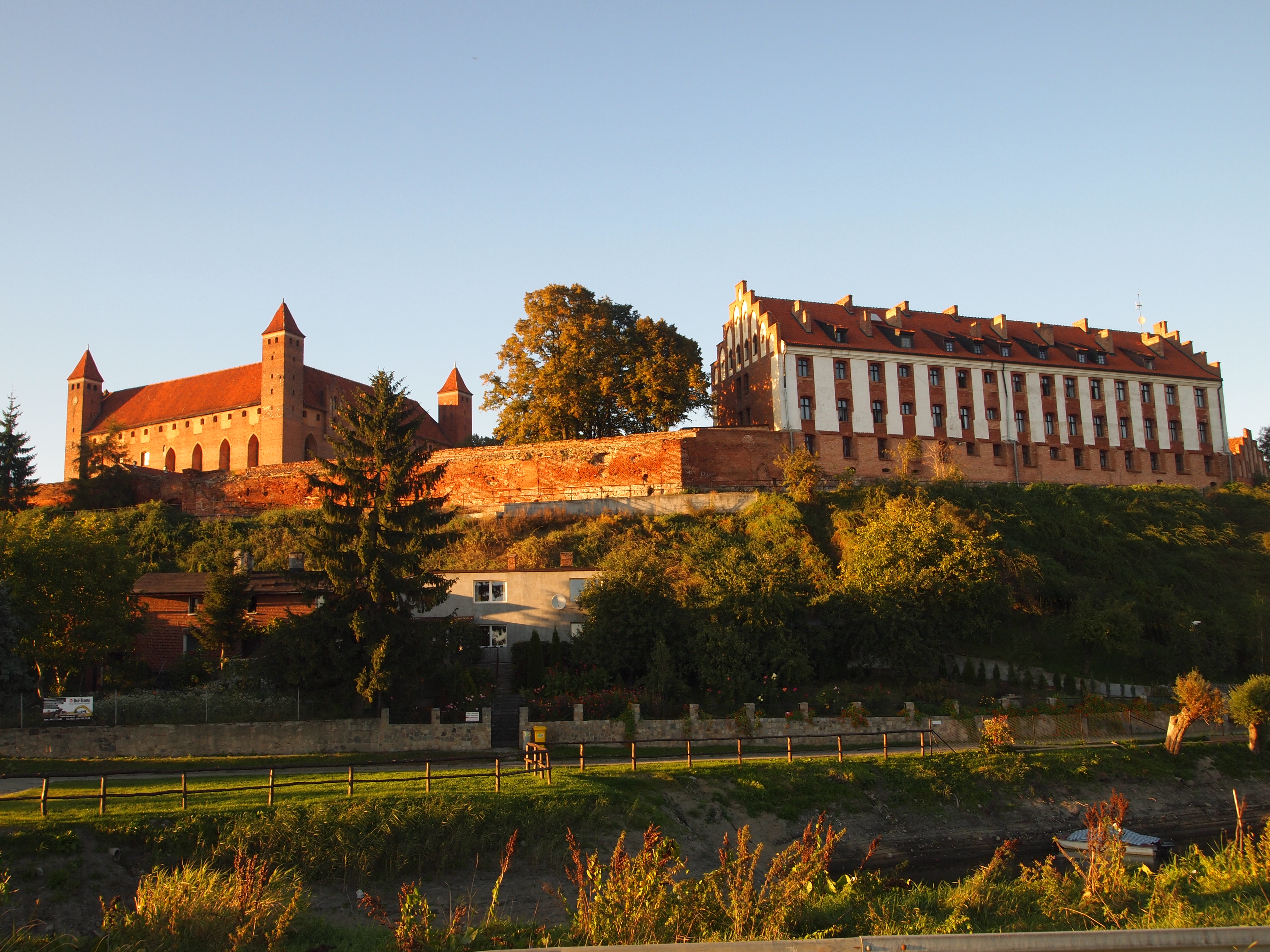 Gniew - zespół zamkowy